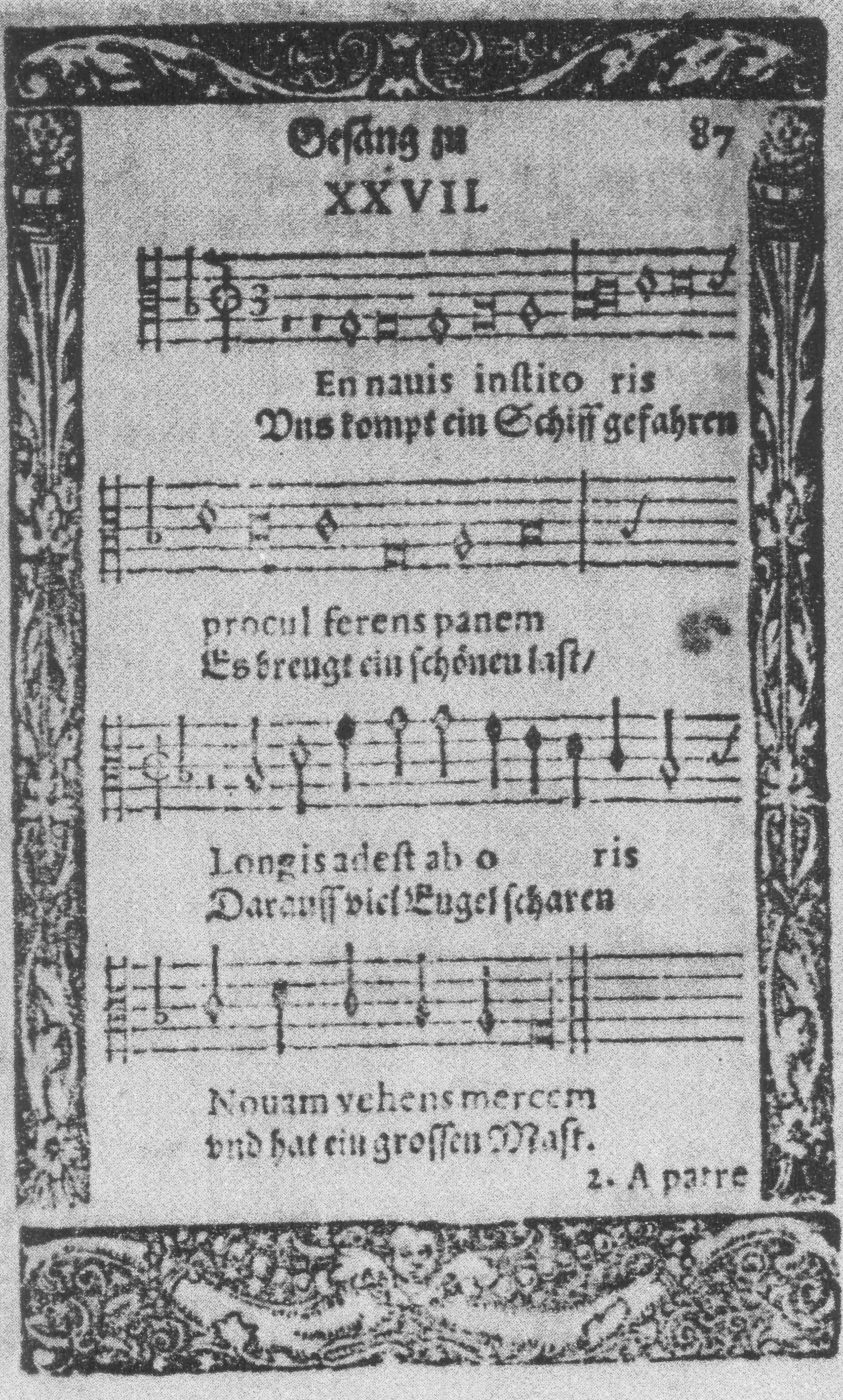 Älteste Melodieüberlieferung von Es kommt ein Schiff, geladen